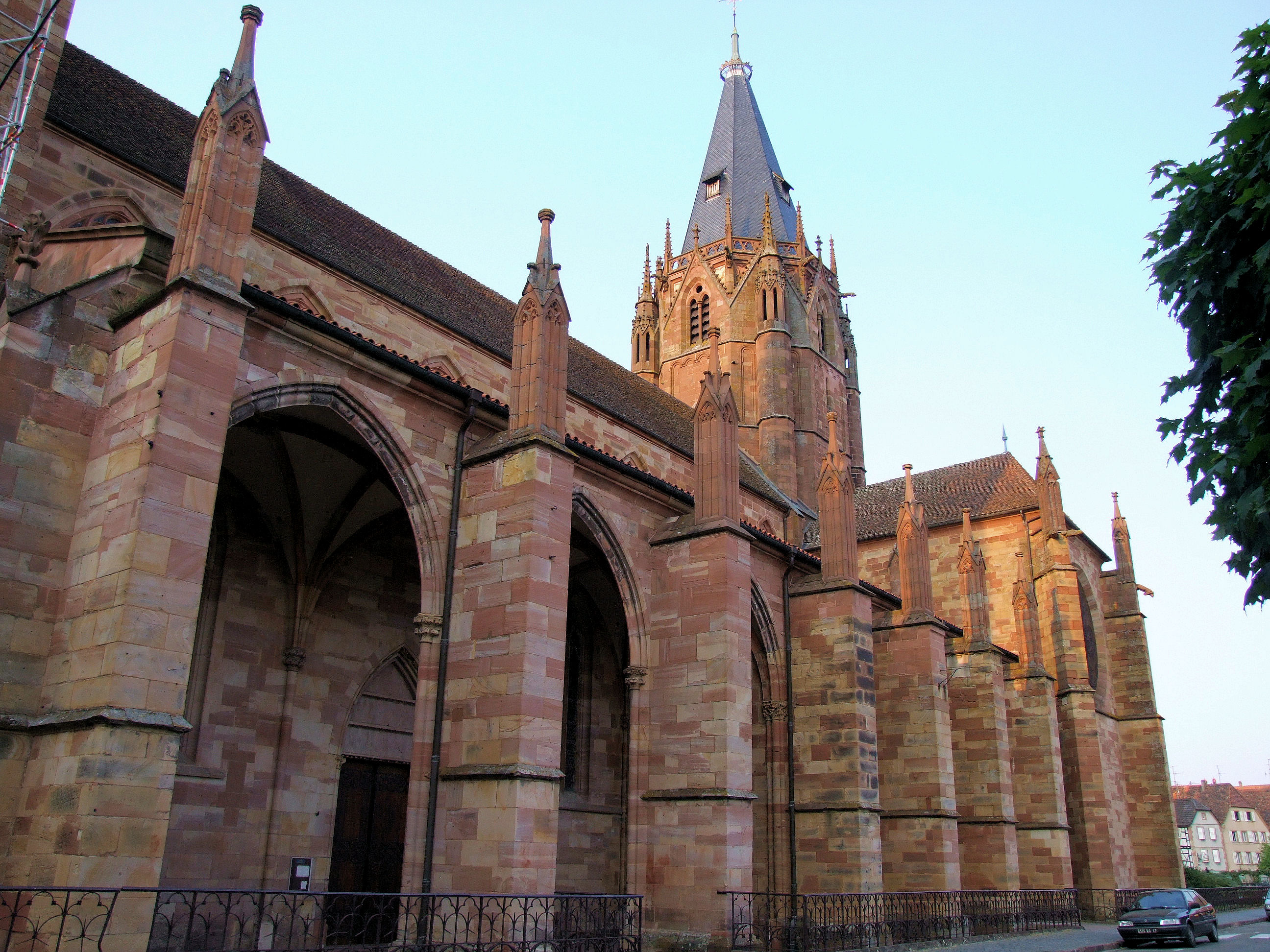 Wissembourg - Eglise Saint-Pierre-et-Saint-Paul - Côté sud de l'église avec le portail latéral